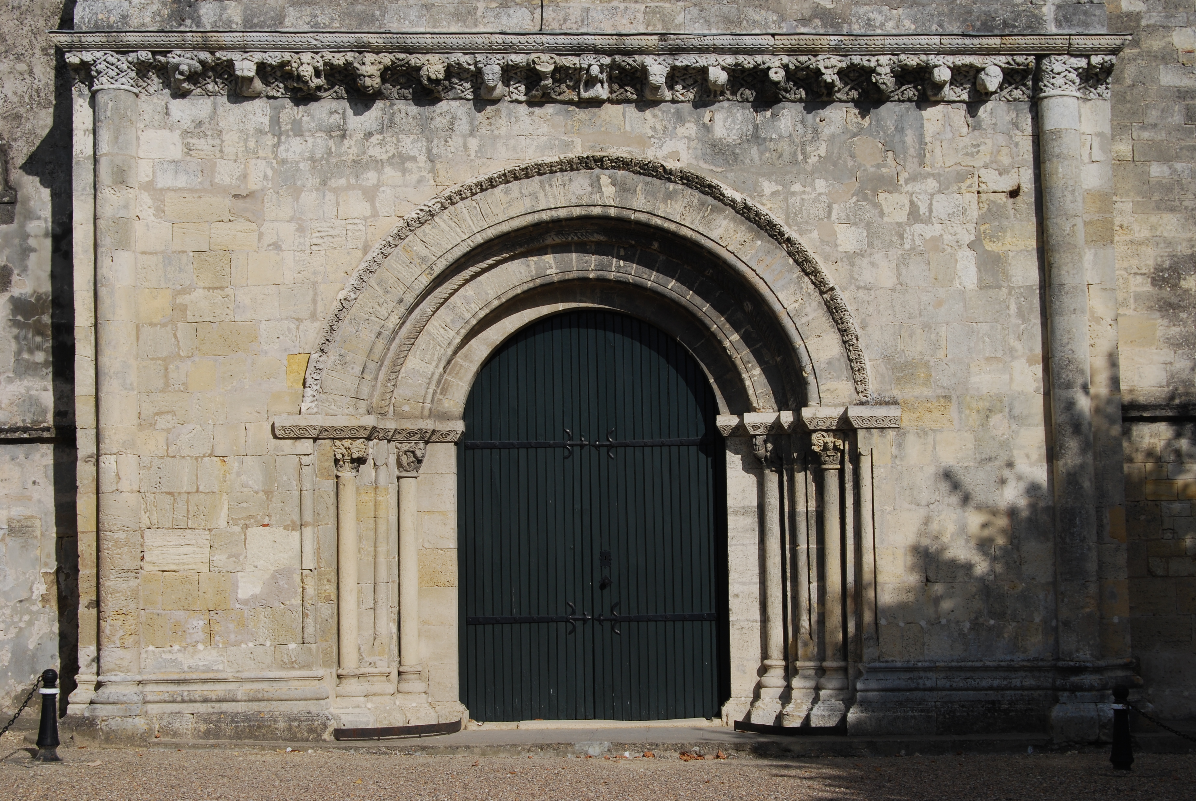 Église Saint-Martin de Cambes, (Inscrit, 2001) .